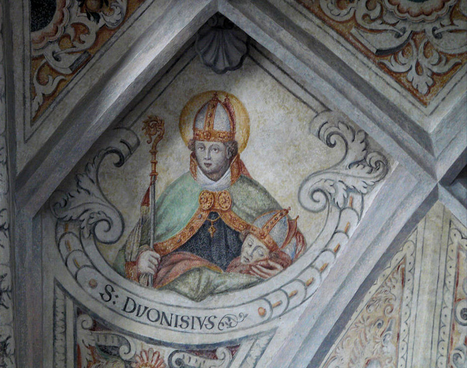 Kloster Seeon, Seeon-Seebruck, Germany